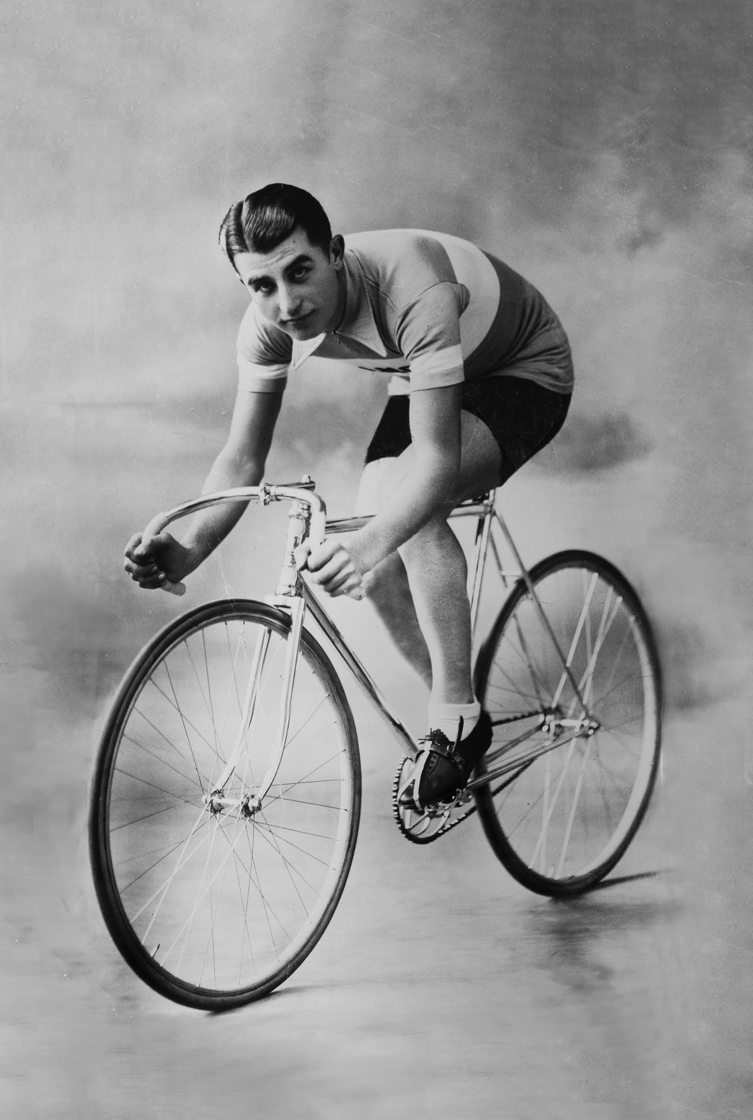 Coureur cycliste italien, recordman du monde de l'heure en 1935